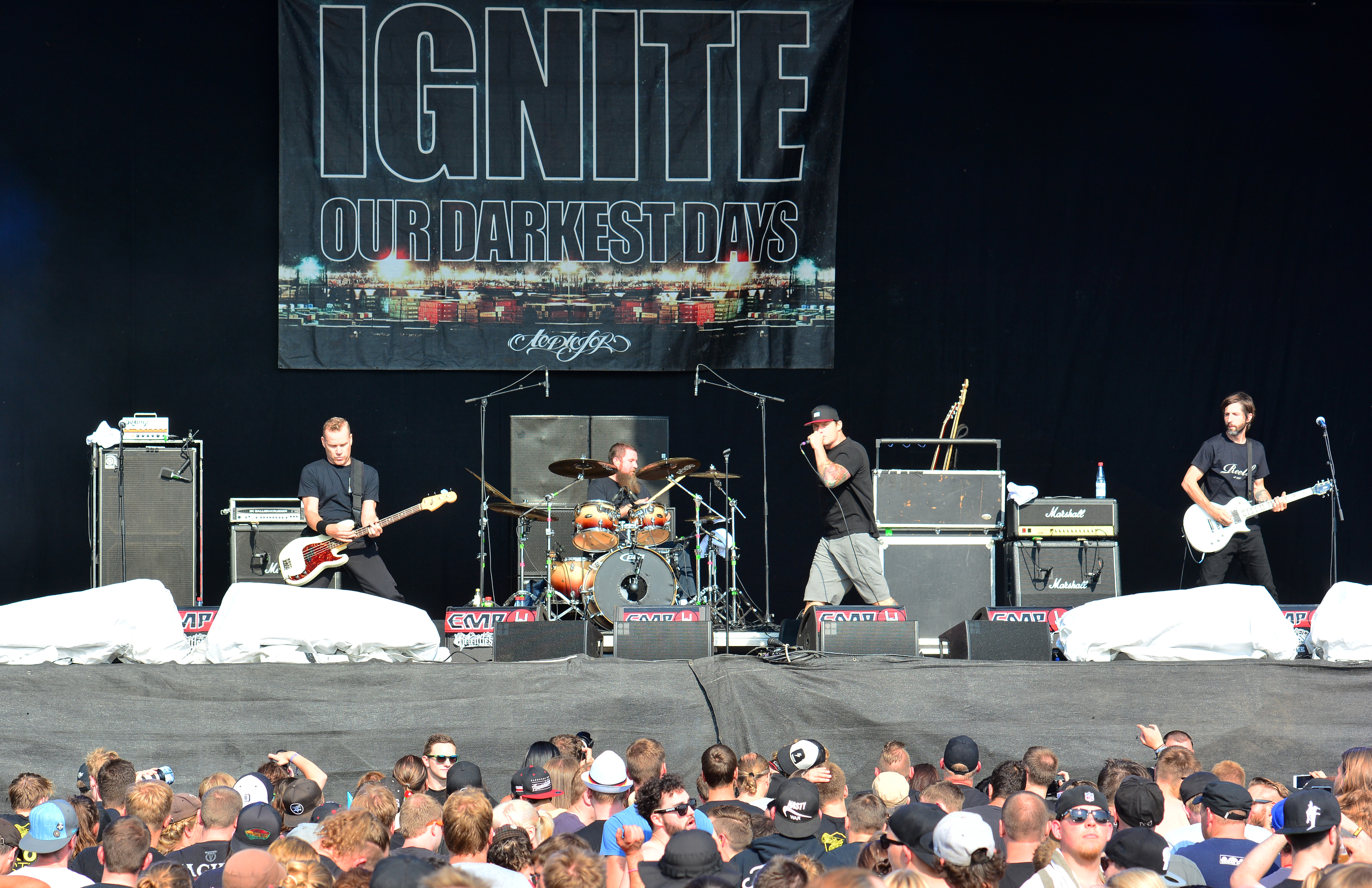 Ignite beim Reload Festival 2015